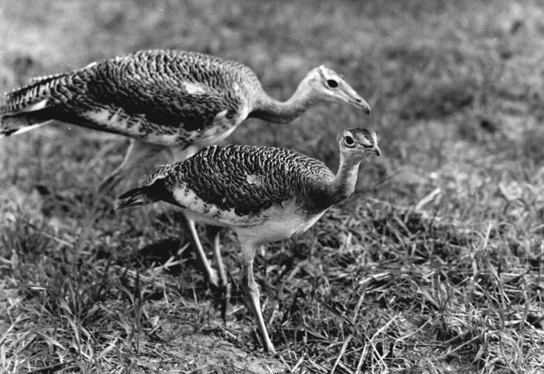 Großtrappen ADN-ZB Link 24.10.1981 Bez. Magdeburg: Schutz der Großtrappe - Bei der künstlichen Aufzucht des schwersten flugfähigen Landvogels der Erde, der Großtrappe (Kranischvogel), haben sich die Mitarbeiter der Biologischen Station in Steckby des Instituts für Landschaftsforschung und Naturschutz der Akademie der Landwirtschaftswissenschaften (AdL) Verdienste erworben. Seit 1973 wurden hier gestörte Gelege von Großtrappen erbrütet, 190 Großtrappen aufgezogen und wieder in Freiheit entlassen. Der vom Aussterben bedrohte Großvogel zählt heute in der DDR etwa 500 Exemplare, auch dank der Bemühungen ehrenamtllicher Naturschutzhelfer. In den 25 Trappen-Schongebieten der DDR werden die Mitarbeiter der LPG jedes Jahr informiert, was während der Brutzeit zu berücksichtigen ist. Die Teppenhenne bebrütet die eier in einer flachen Nestmulde auf Wiesen, Getreide- und Rapsfeldern und kann dort leicht gestört werden. Die Großtrappe ist eine in der ganzen Welt geschützte Vogelart. Beim Internationalen Rat für Voglschutz wurde eine Arbeitsgruppe Trappen gebildet. An den regelmäßig stattfindenden RGW-Trappen-Symposien beteiligt sich die AdL.